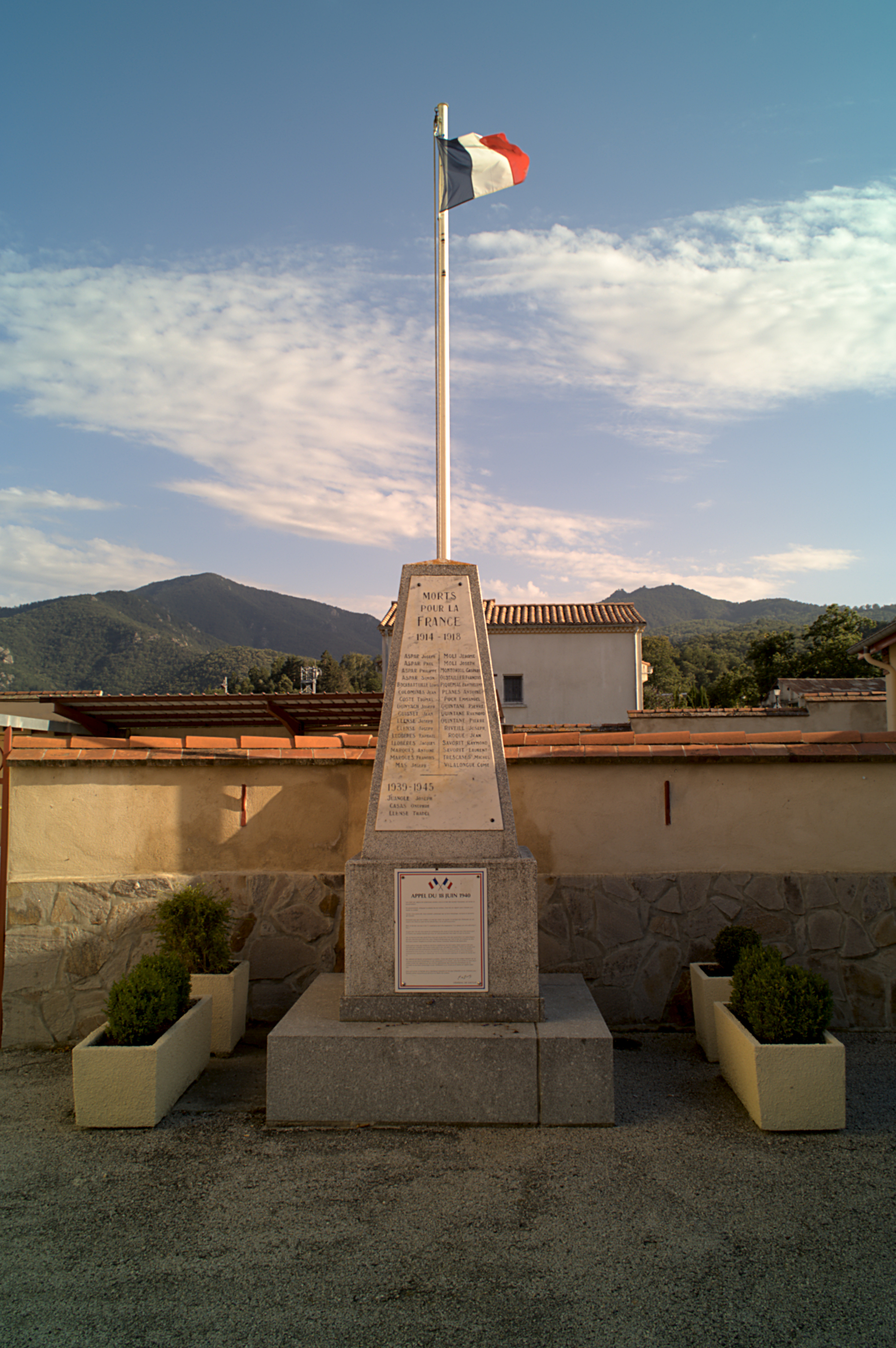 Monument aux Morts, rue Abdon Poggi, Serralongue (Pyrénées-Orientales, Languedoc-Roussillon, France)